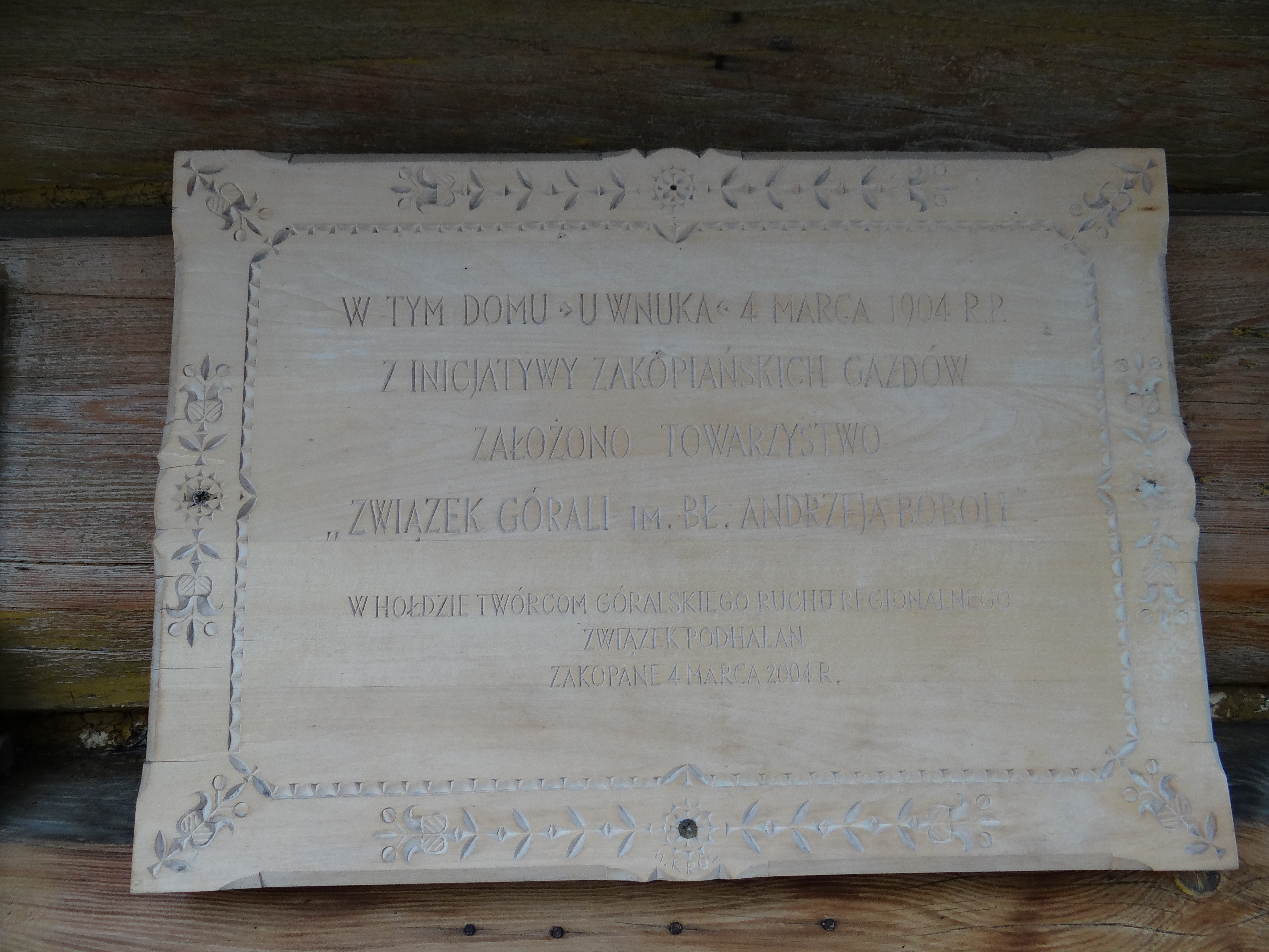 „Czarna owca” Zakopane, ul. Kościeliska 3, Zakopane